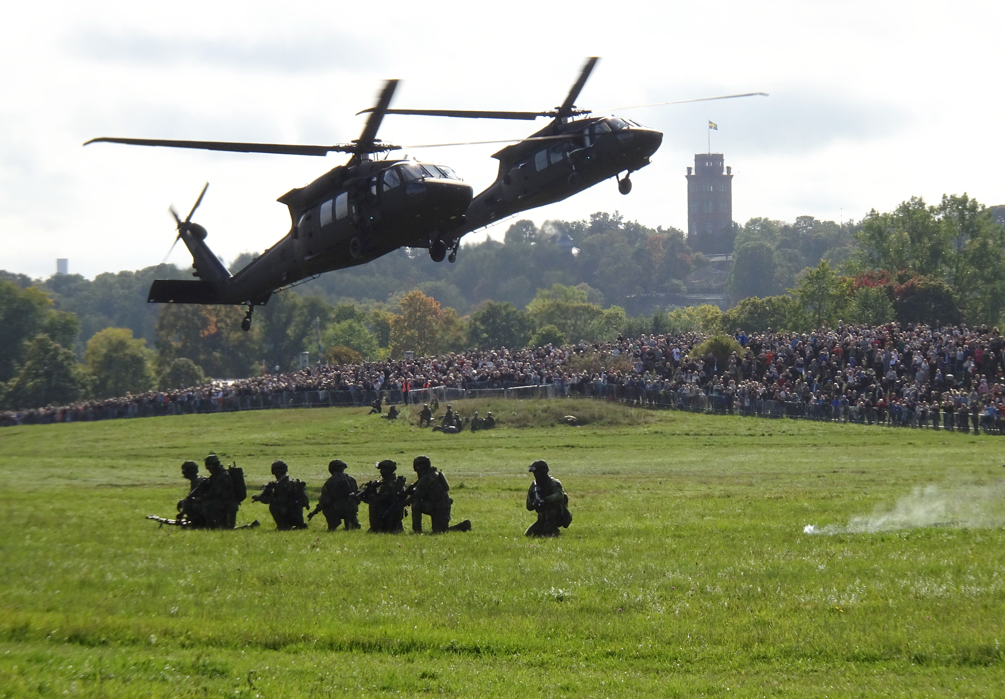 Aurora 17, Uppvisning och övning på Gärdet